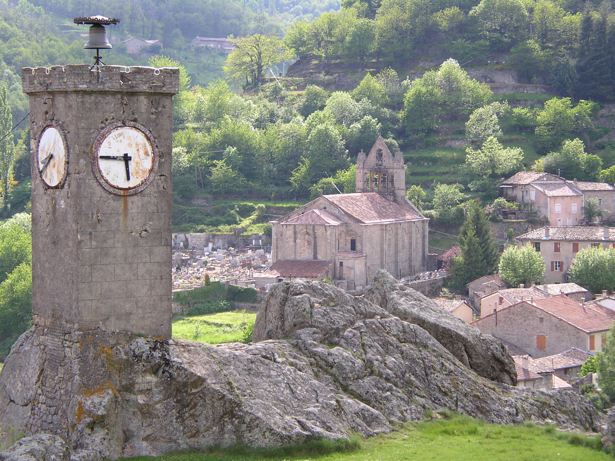 En arrière plan l'église Saint-André de Burzet